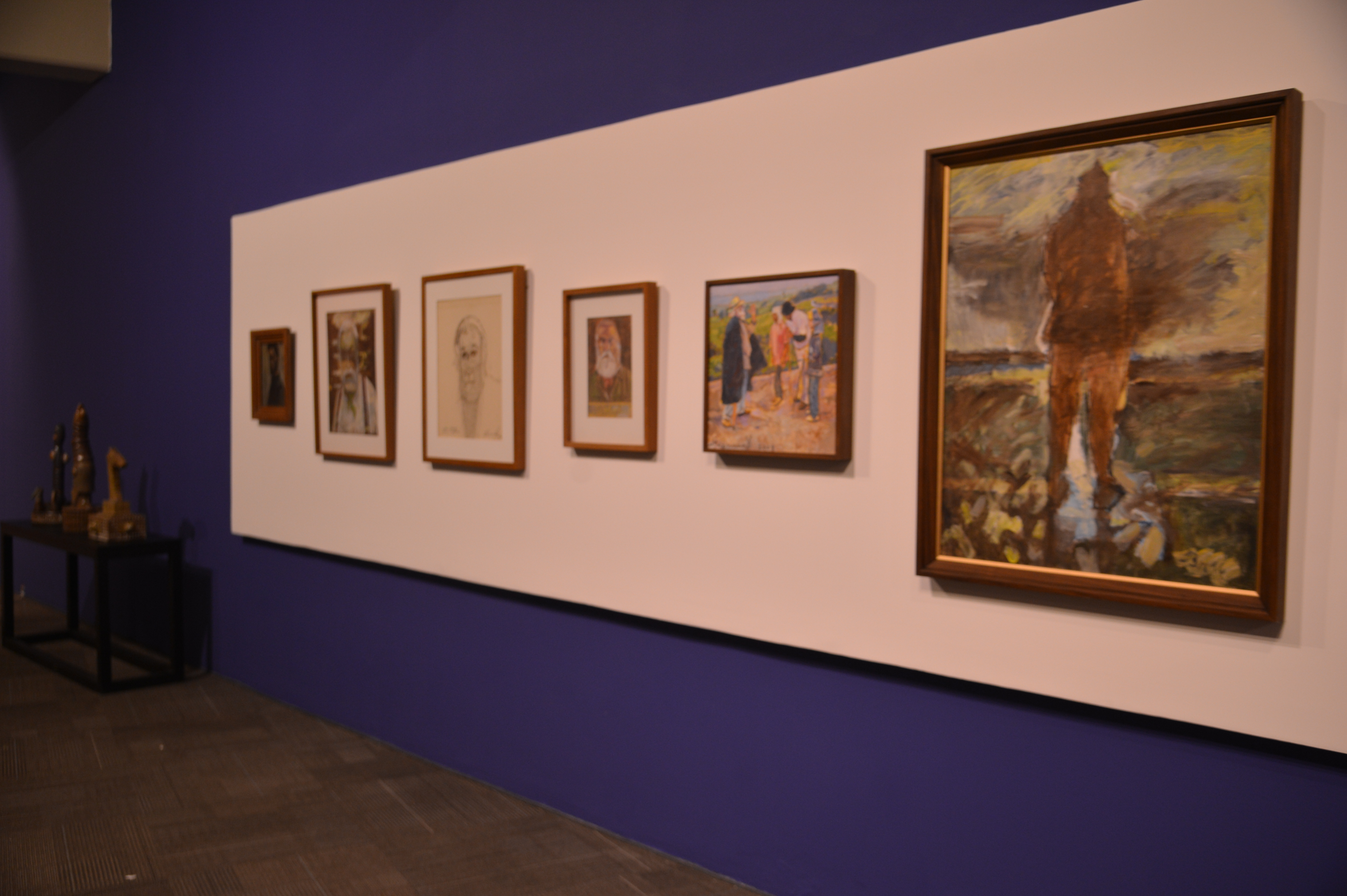 São Paulo - Exposição Francisco Brennand – Mestre dos Sonhos, na Caixa Cultural São Paulo, no centro da capital paulista (Rovena Rosa/Agência Brasil)